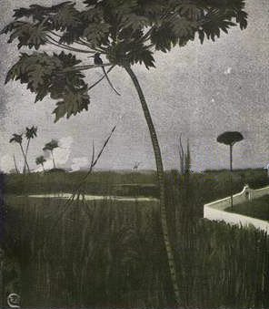 Portada de La manigua sentimental.